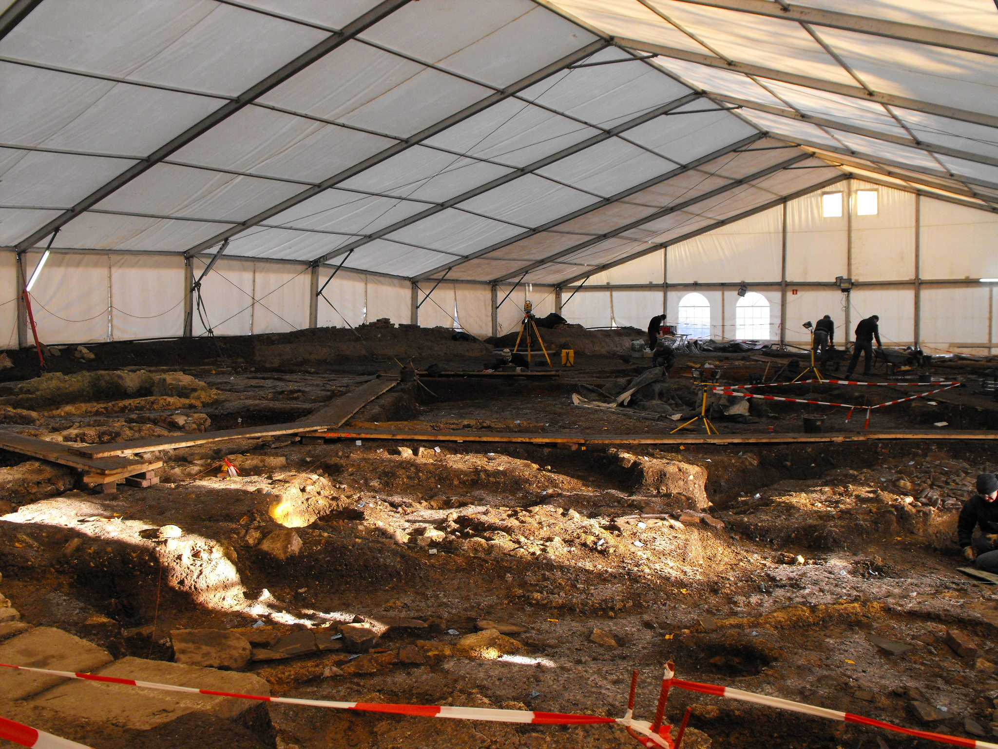 Ausgrabung im Elisengarten 2008; Grabungszelt